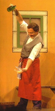 Armando Felgueroso en la obra "El Pariente d'América", d'Alfonso Iglesias, nun representación de la Compañía Asturiana de Comedies.